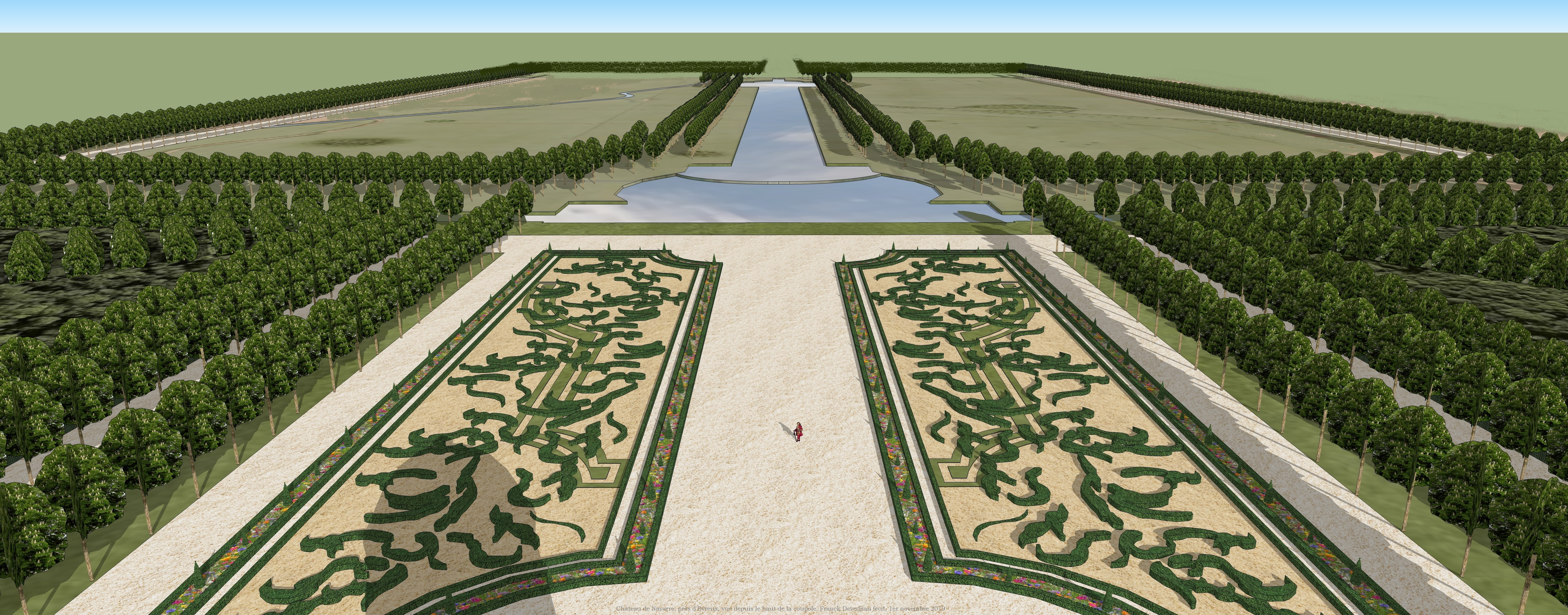 Restitution de la perspective du château de Navarre, près d'Evreux.